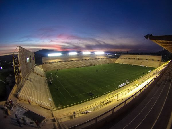 Nuevo Estadio Tecnologico de Oaxaca